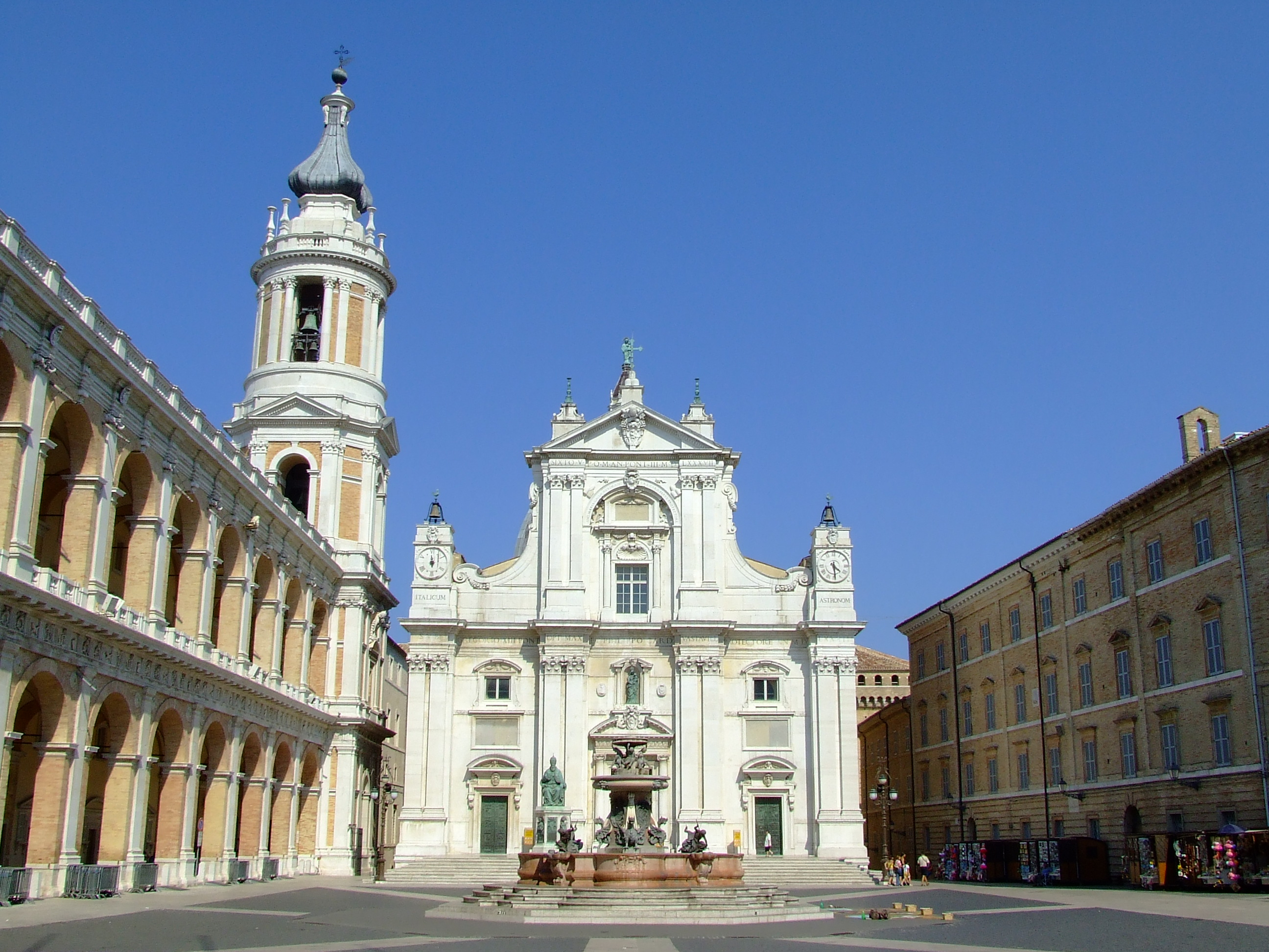 Basilica del Santuario di Loreto